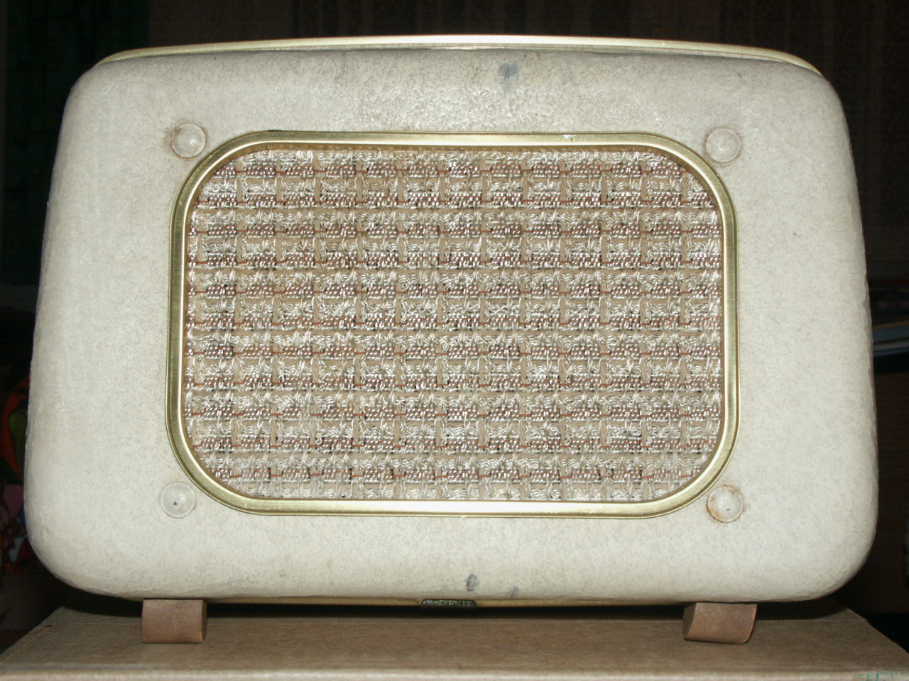 Lautsprecher "Isonetta" von Isophon, 1950er Jahre, Größe 24x18x9 cm